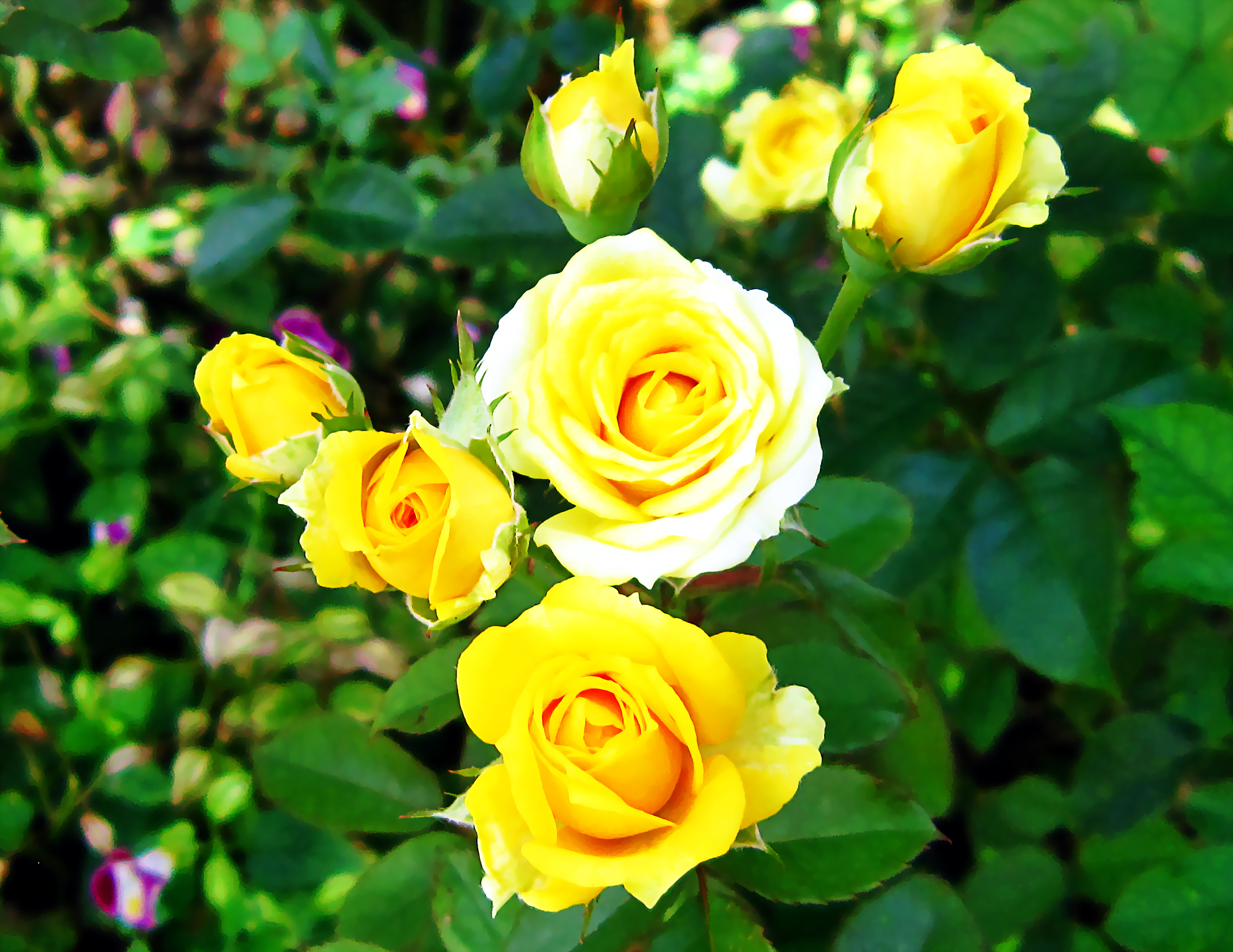 Hoa hồng vàng trên núi Cấm (An Giang, Việt Nam).